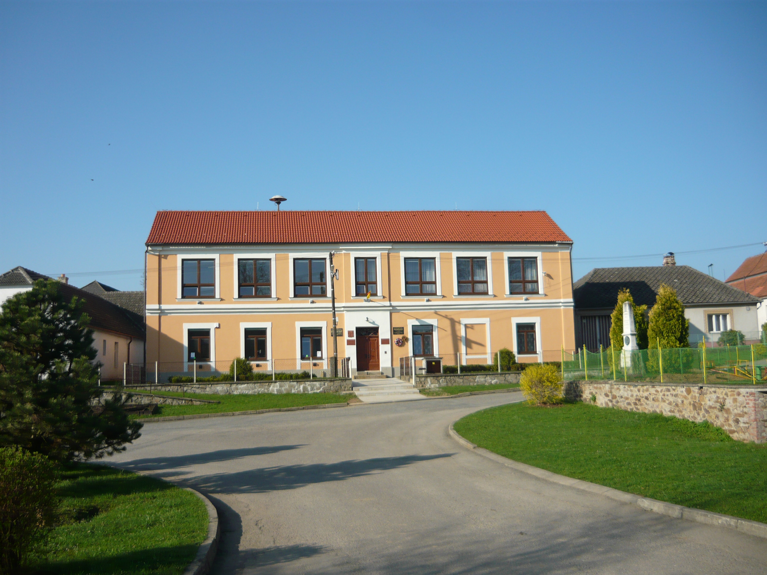 Budova Obecního úřadu v Martínkově